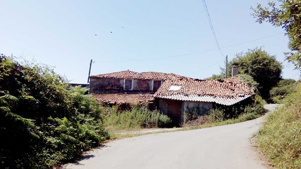 Vista de Vilares, Curtis.